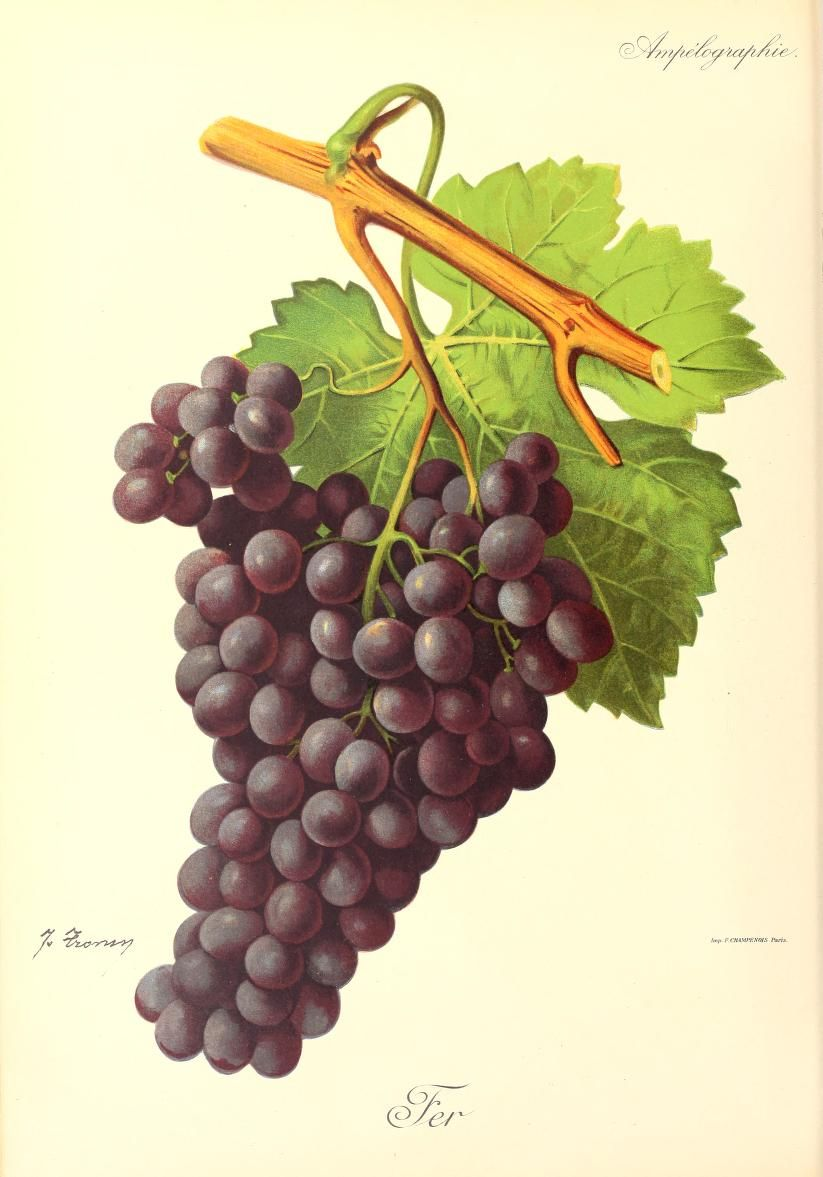 Illustration du cépage Fer par Jules Troncy dans l'ouvrage "Ampélographie : traité général de viticulture" publié sous la direction de P. Viala & V. Vermorel avec la collaboration de A. Bacon, A. Barbier, A. Berget [et al.] - Date de l'édition originale : 1901-1910